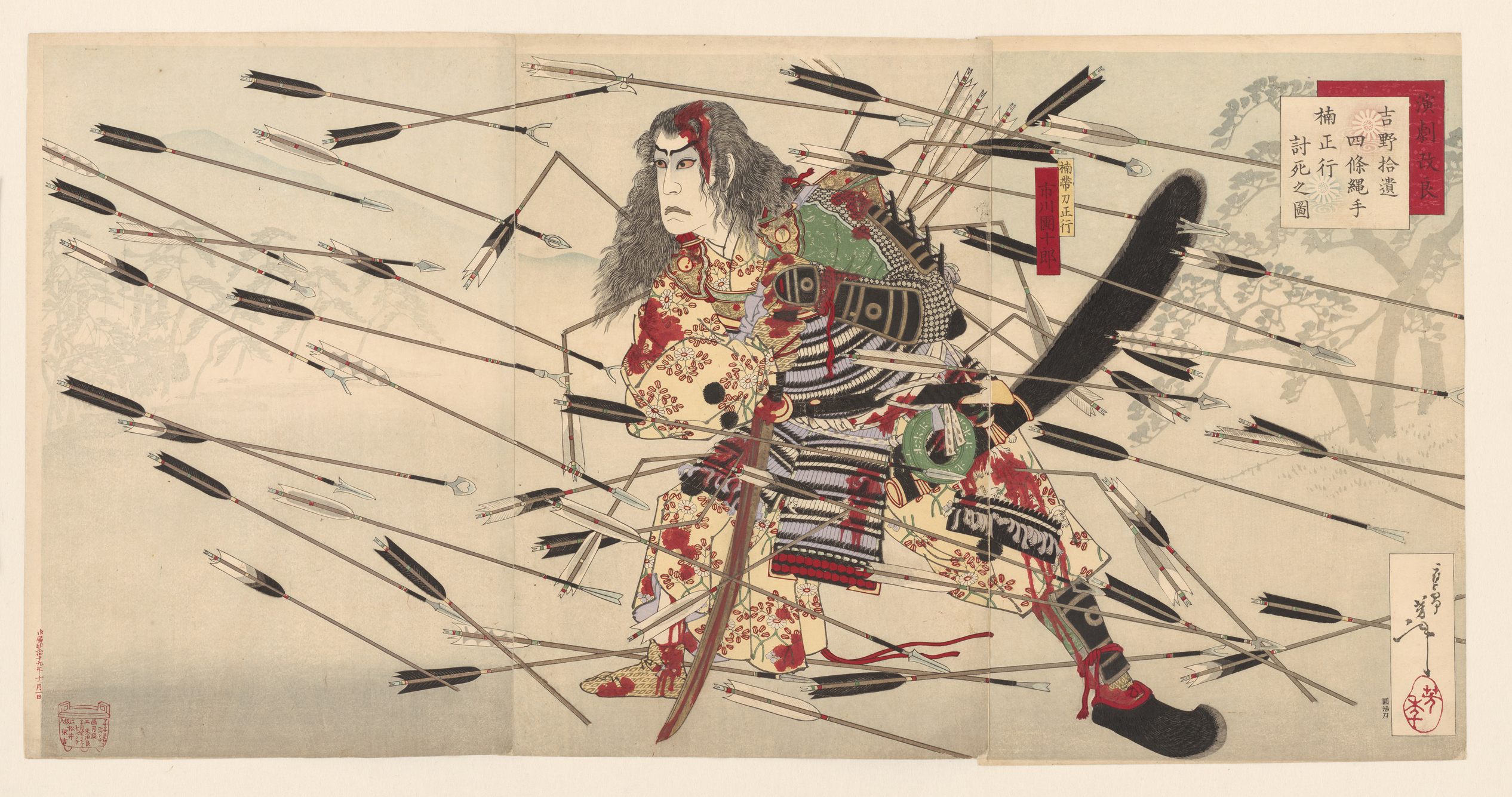 芳年画「演劇改良」より『吉野拾遺四條縄手 楠正行討死之圖 楠帯刀正行 市川団十郎』、3枚揃錦絵